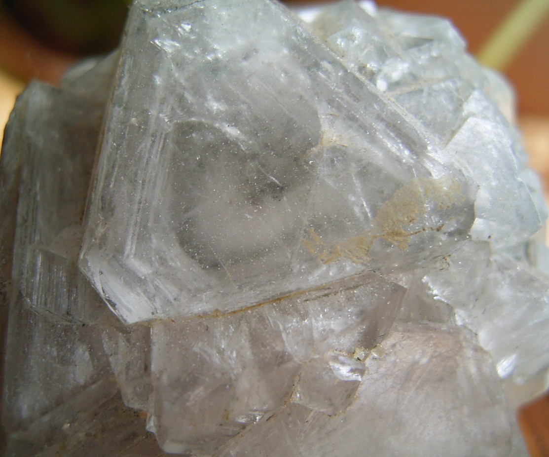 Alunit_Montcada,Barcelona,Spanien